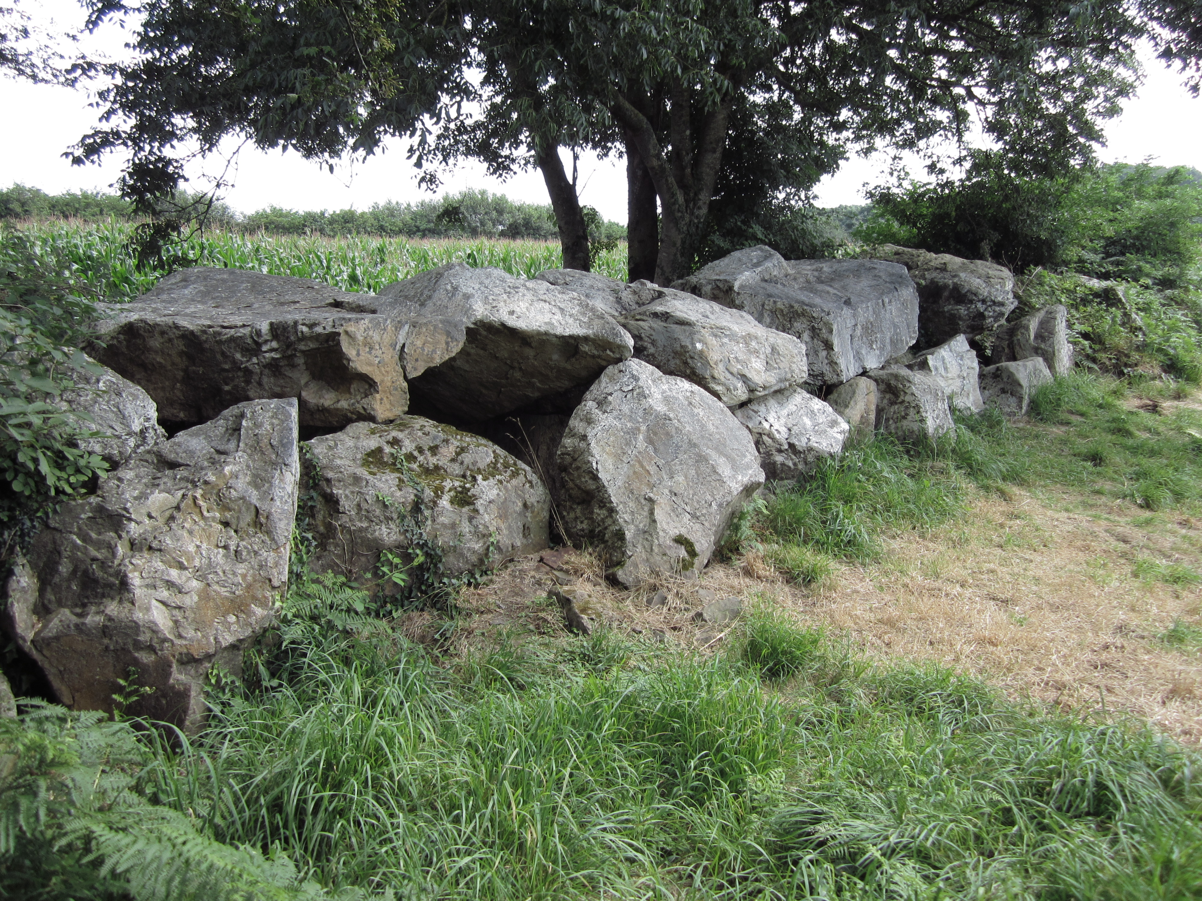 Autel des druides des Les Moitiers-d'Allonne .